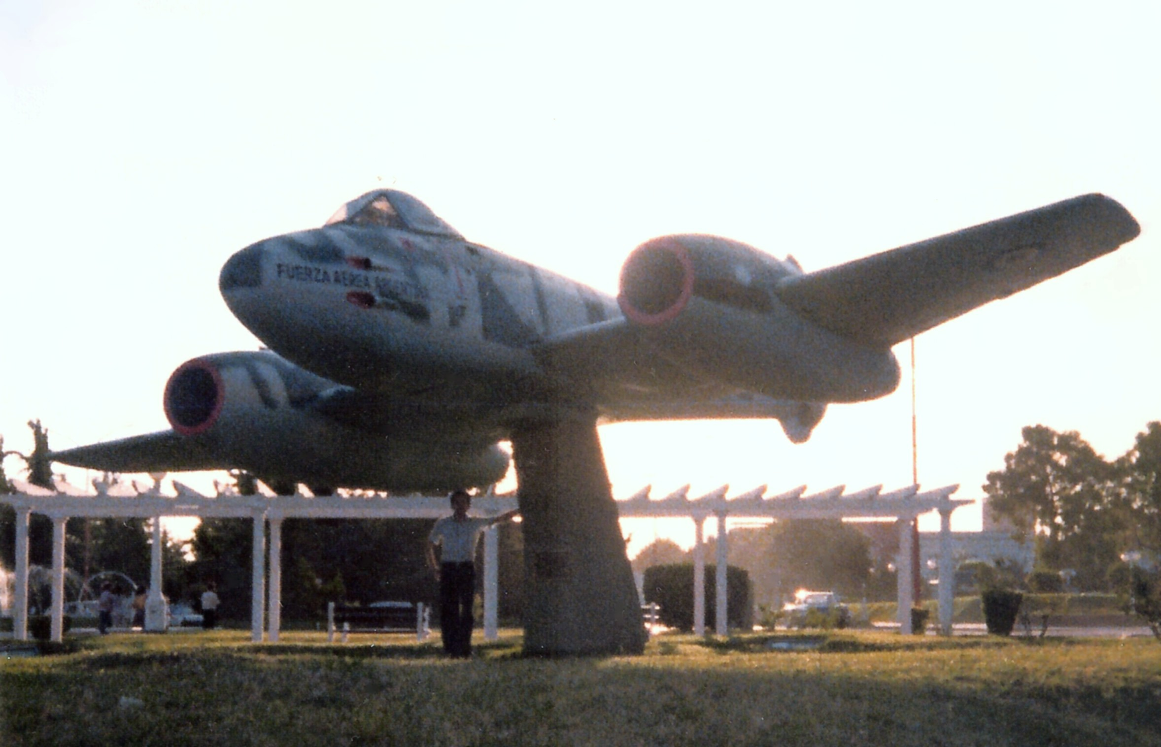 Antigua imagen de la Plaza Veteranos de Malvinas (en ese entonces llamada "Fuerzas Armadas") de Junín, hacia 1980, con el avión Gloster Meteor que luego sería trasladado al Aeroclub.